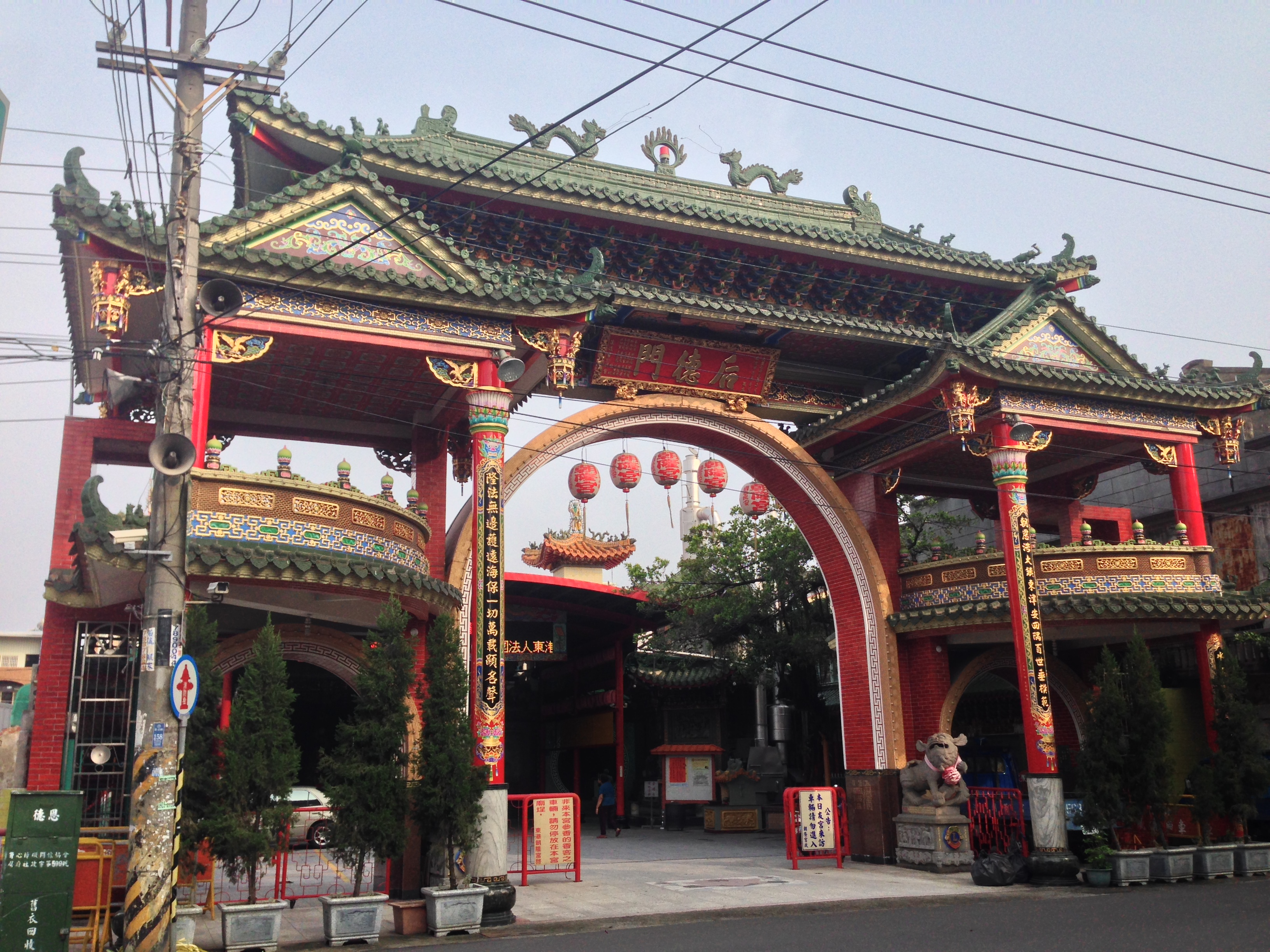 中文（台灣）: 東港朝隆宮牌樓